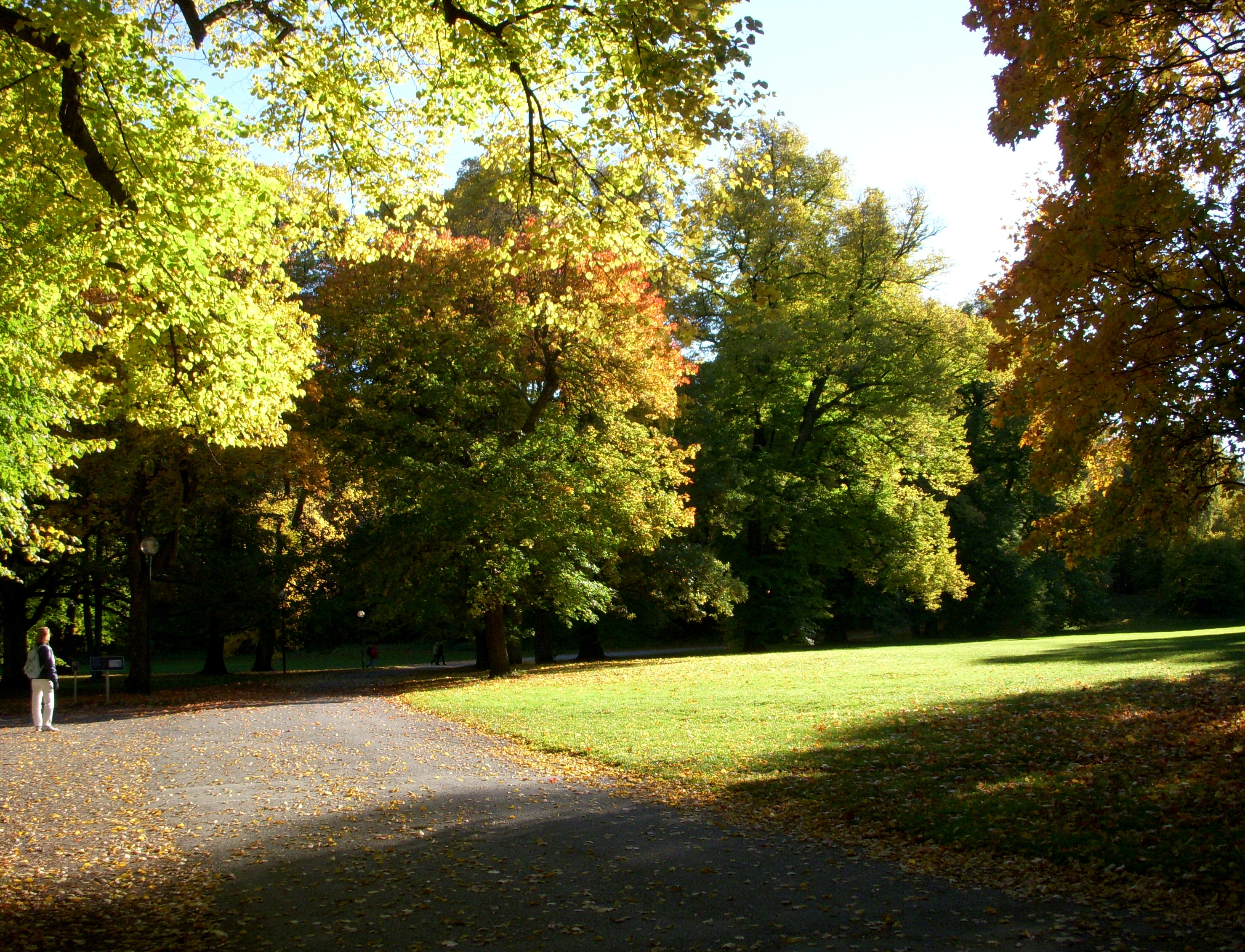 Hagaparken (Vasaslätten) på hösten